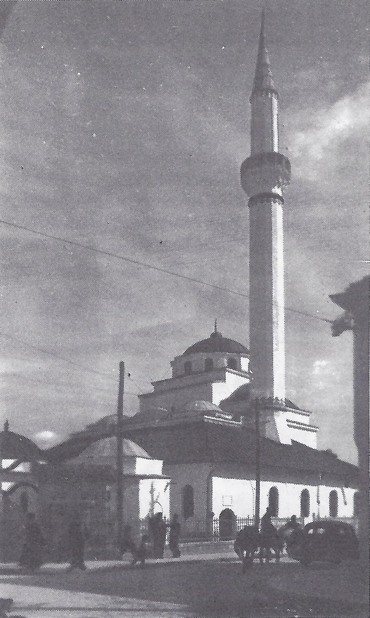 Džamija Ferhadija (Banja Luka).